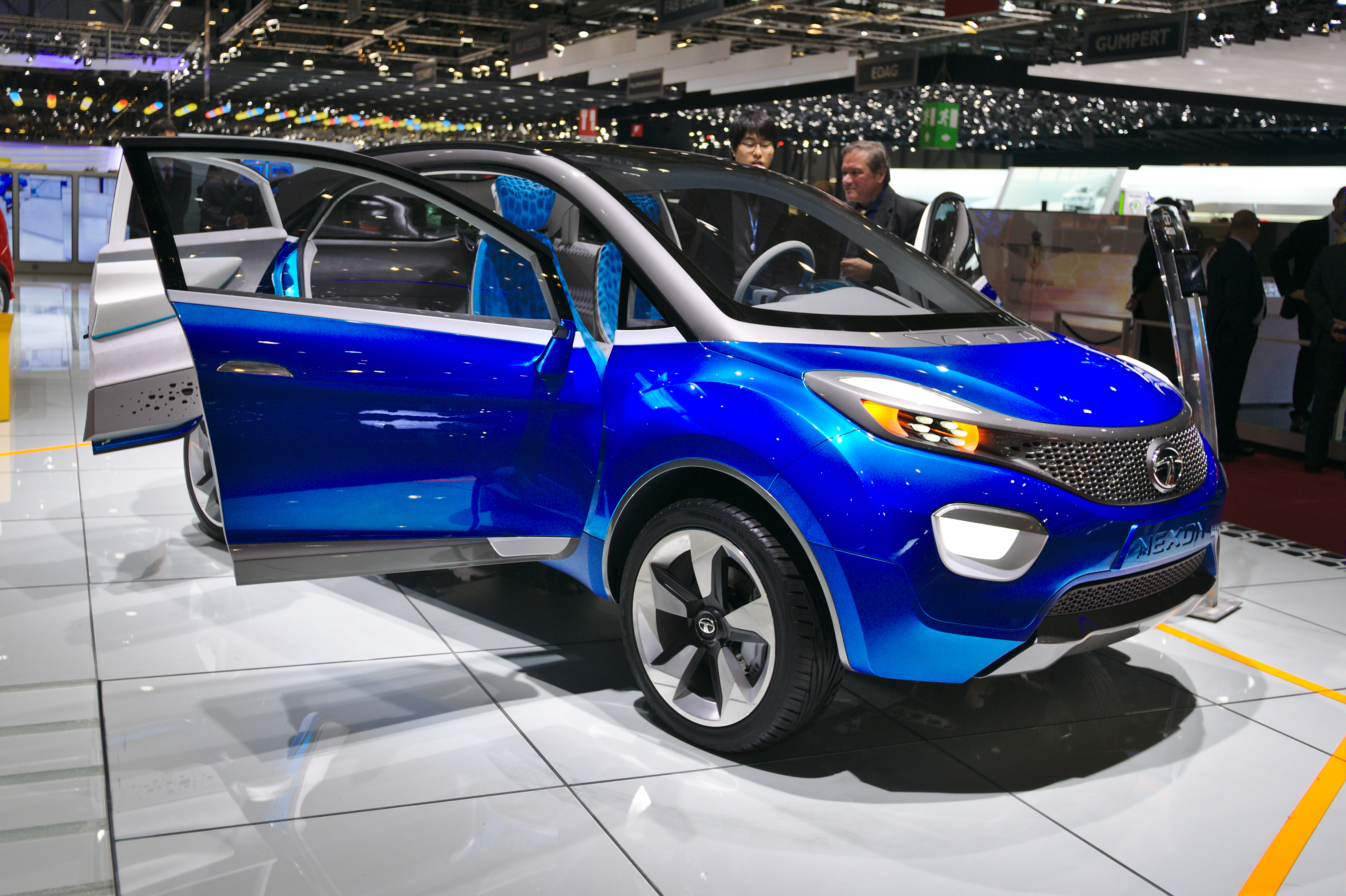 Salon de l'auto de Genève 2014 - 20140305 - Tata Nexon